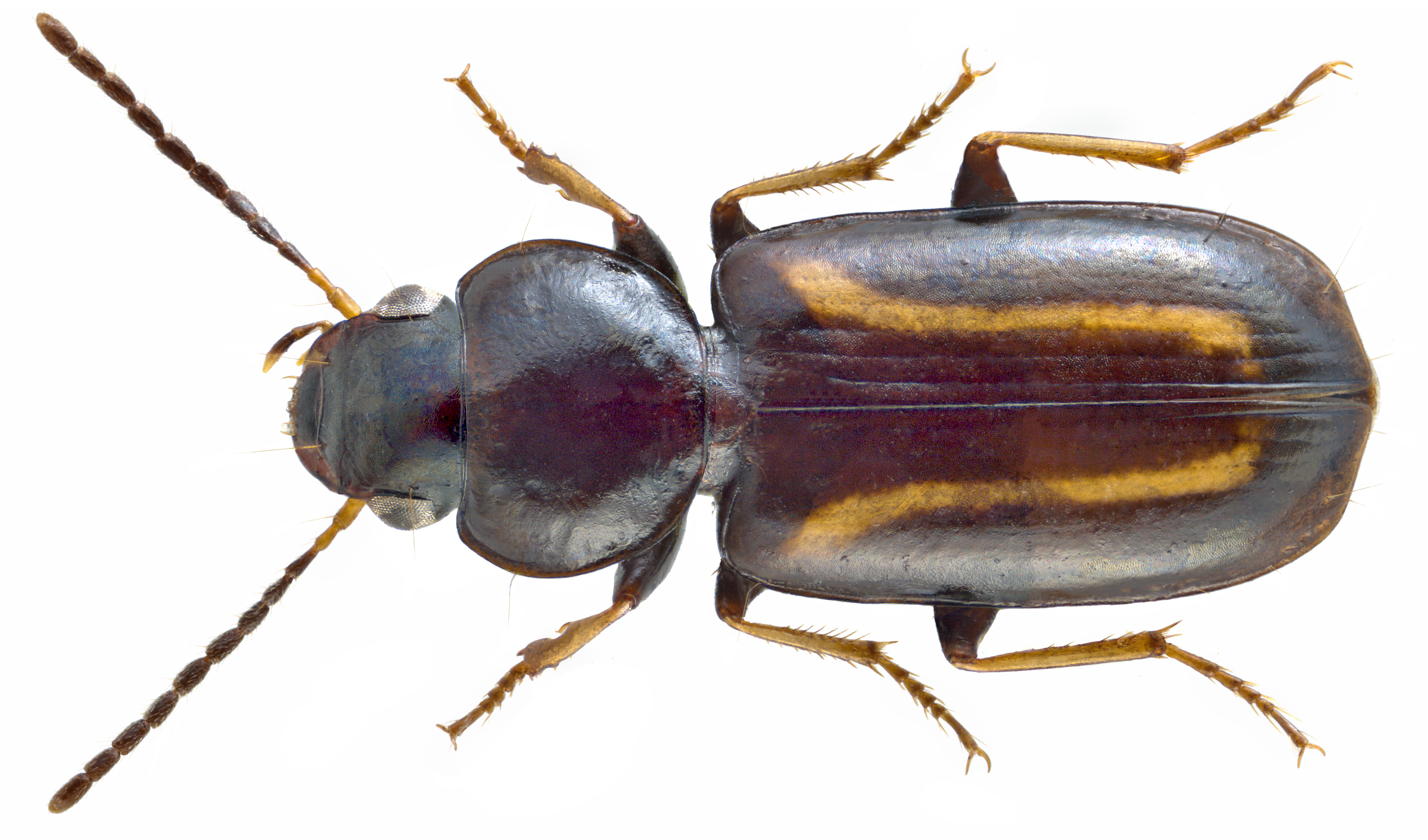 Family: Carabidae Size: 4,8 mm Location: Namibia, Etosha National Park, Okaukuejo, 1400 m leg. U.Schmidt, 18.-20.III.1994; det. M.Baehr, 2012 Photo: U.Schmidt, 2014